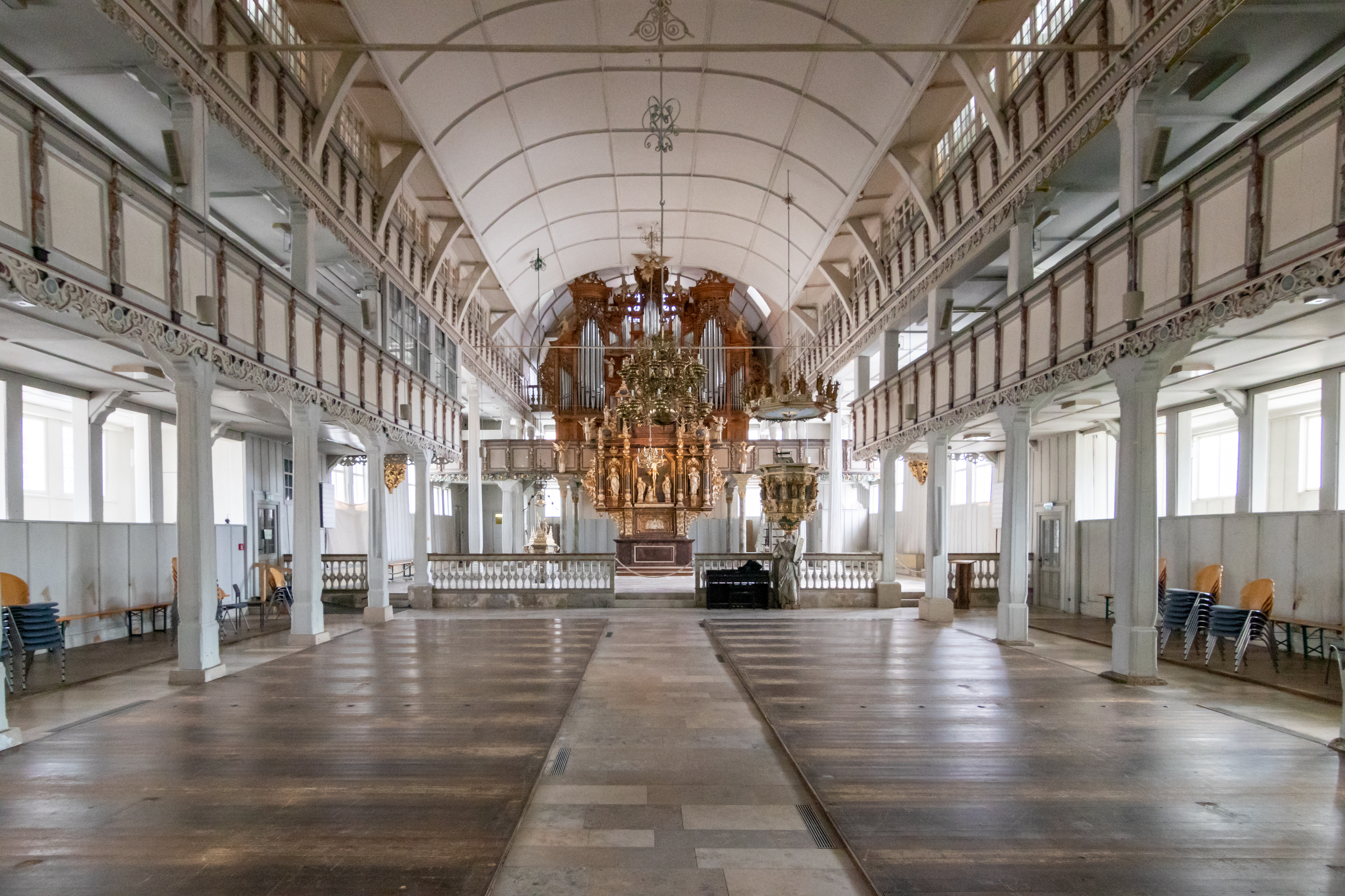 Die evangelisch-lutherische Marktkirche zum Heiligen Geist ist die historische Hauptkirche im Ortsteil Clausthal der Bergstadt Clausthal-Zellerfeld. Sie ist die größte Holzkirche Deutschlands und gehört durch ihre Architektur und Ausstattung zu den bedeutendsten Baudenkmälern des norddeutschen Barocks. Blick in den Innenraum